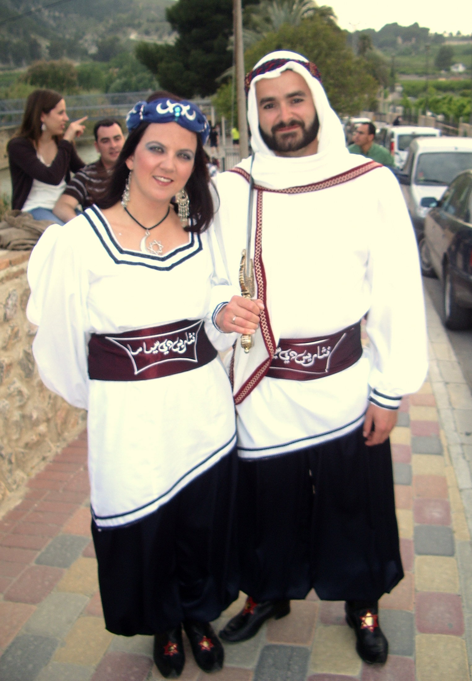 Trajes de dos miembros de una kábila participante en la fiesta de moros y cristiano de Cieza, 2009